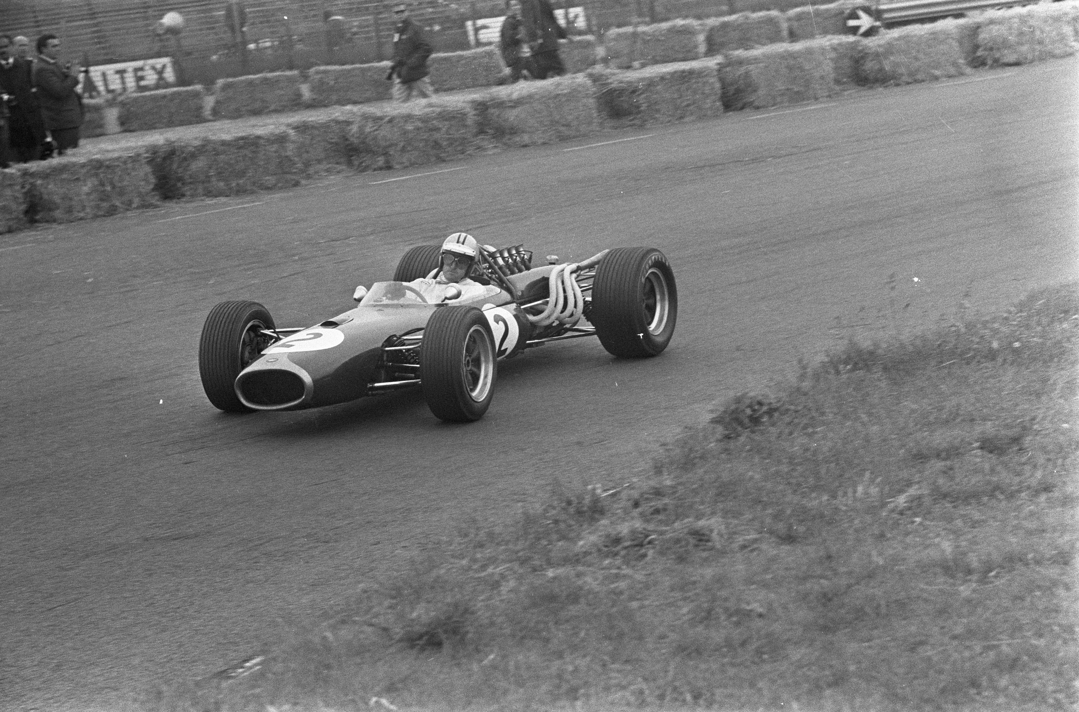 Training Grand Prix te Zandvoort, Denis Hulme met Repco Brabham.